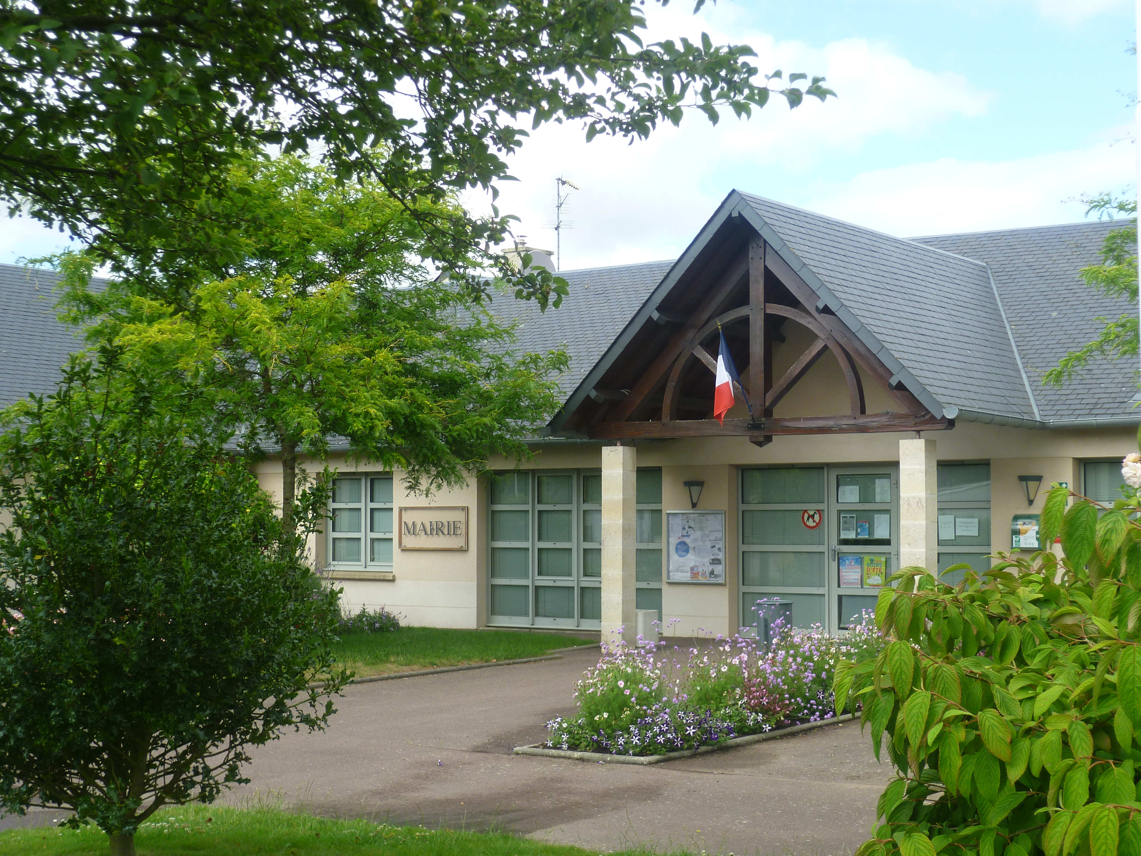 Mairie de Tourville-Sur-Odon